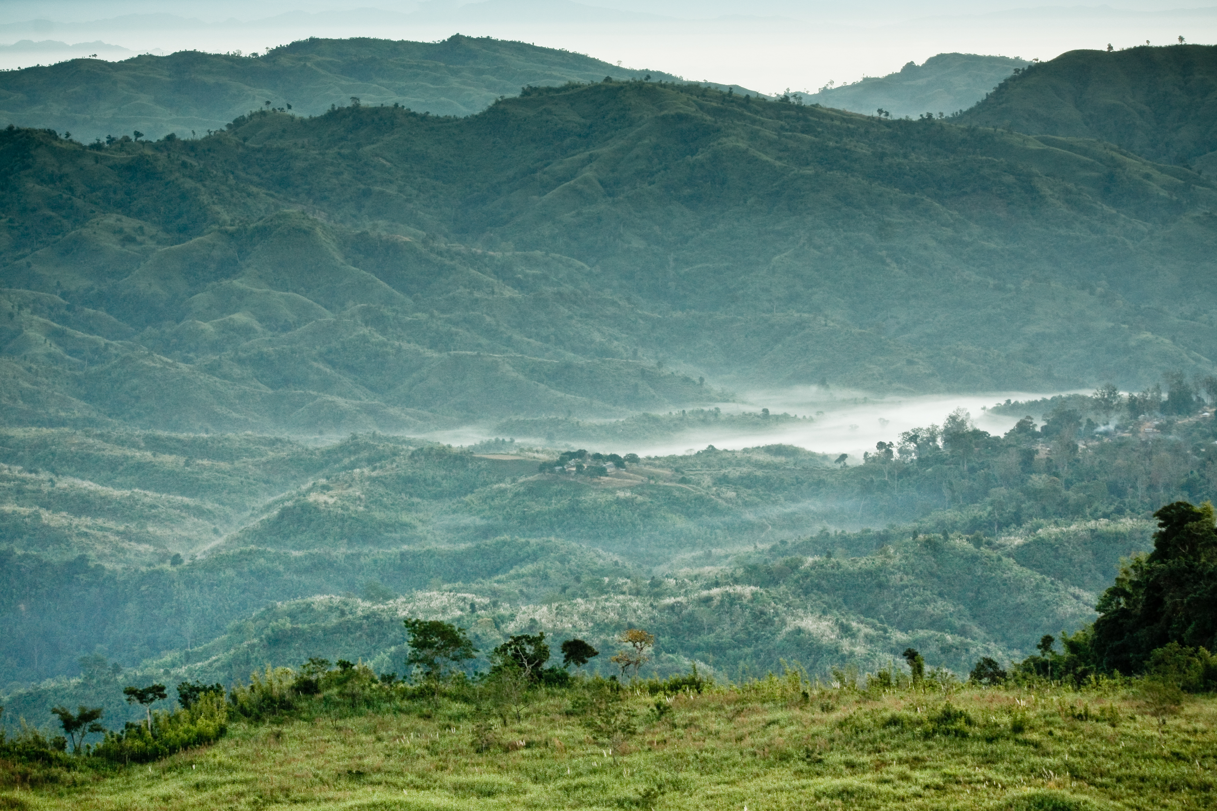 6:24 AM :: niche paharer vaaj e tokhono onek gula jaygay kuasha jome jome chilo. mone hoitasilo choto belar jemon ghum vainga geleo shokal bela baba aisha taina tula na porjonto motka maira poira thaktam, sheirom shurjer alo aisha gaye na pora porjonto inara uthben na boila thik korsen